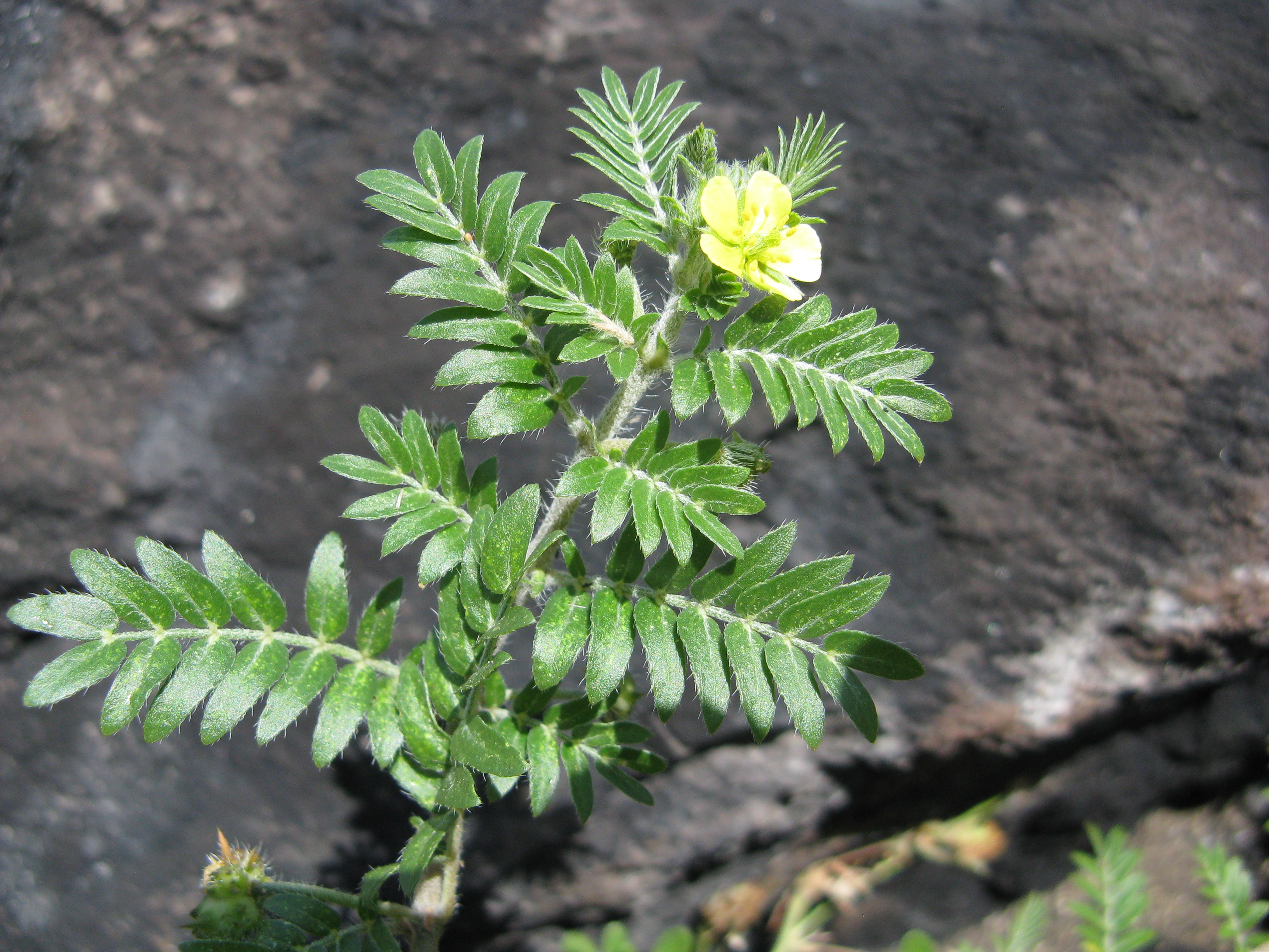 Виходи аркозових пісковиків, м. Кривий Ріг, Селище Південного ГЗК, лівий берег р. Інгулець